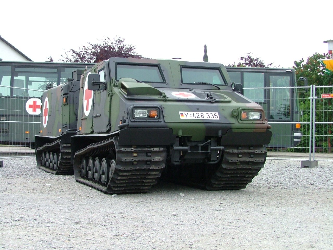 BV206S "Husky" als Sanitätsvariante für die Bundeswehr. Die Fahrzeuge von Hägglunds werden in den Sanitätseinheiten der Gebirgs- und Fallschirmjägereinheiten eingesetzt.